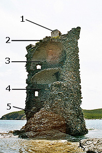 Tour Santa Maria (Cap Corse) Légende : guardiola terrasse salle de garde salle de repos réserves